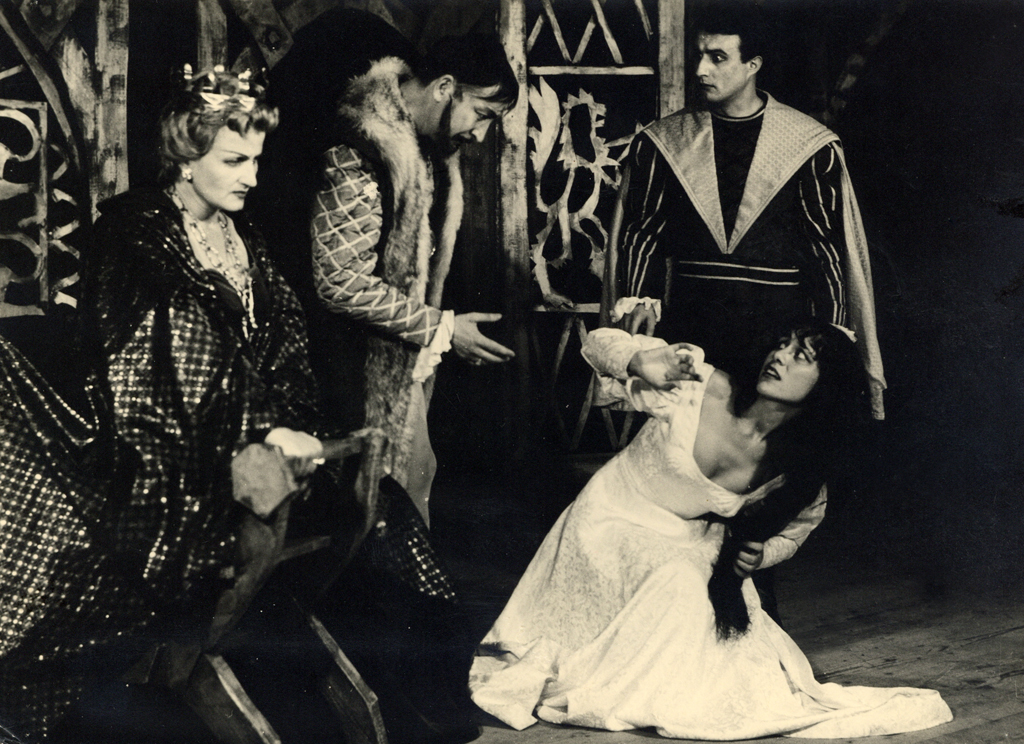 William Shakespeare, Hamlet, Slovensko gledališče v Trstu. Na fotografiji: Zlata Rodošek (Gertruda), Jožko Lukeš (Klavdij), Alojz Milič (Gilderstein), Miranda Caharija (Ofelija).